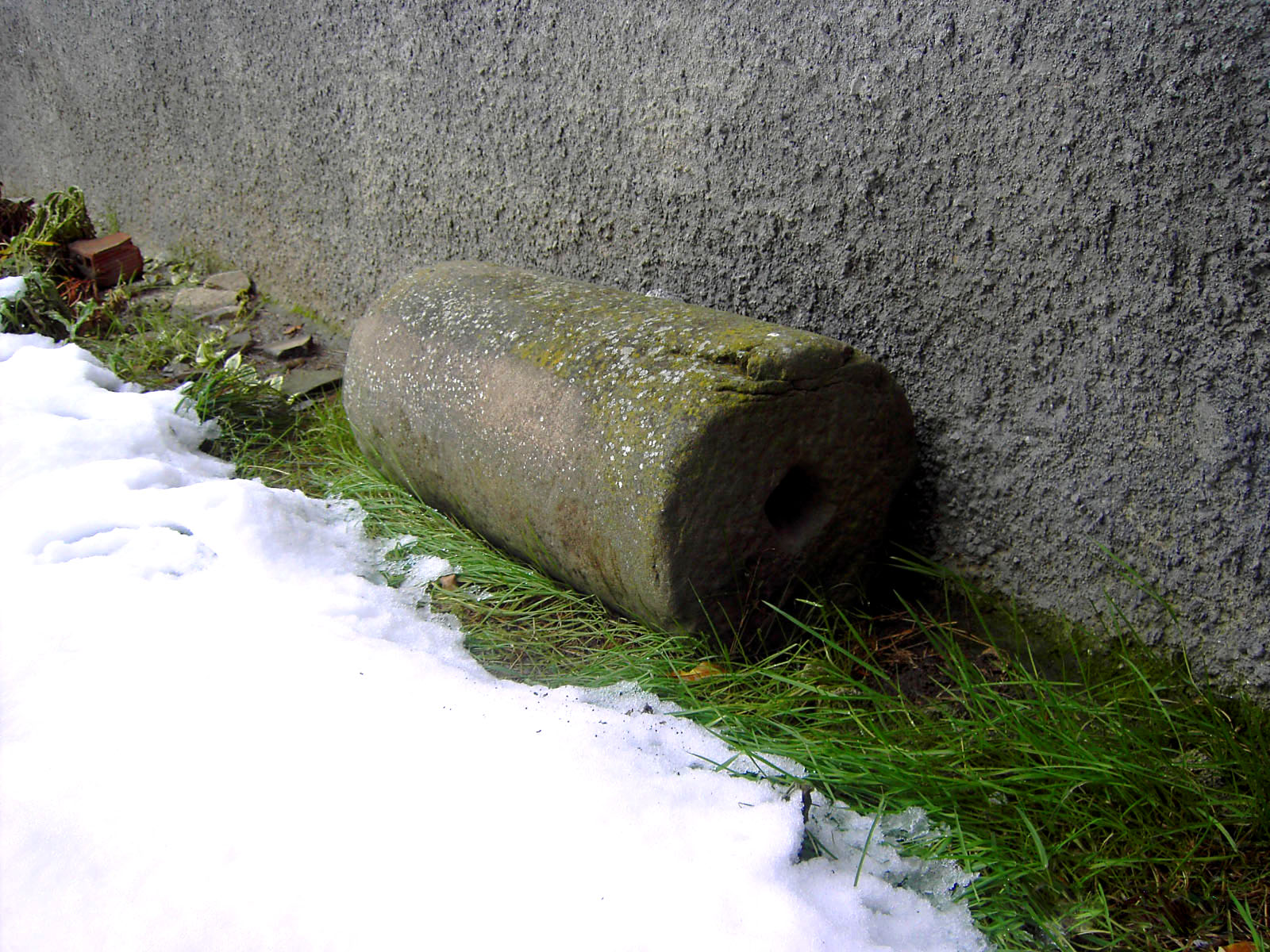 Aragonés: Ruello d'era.